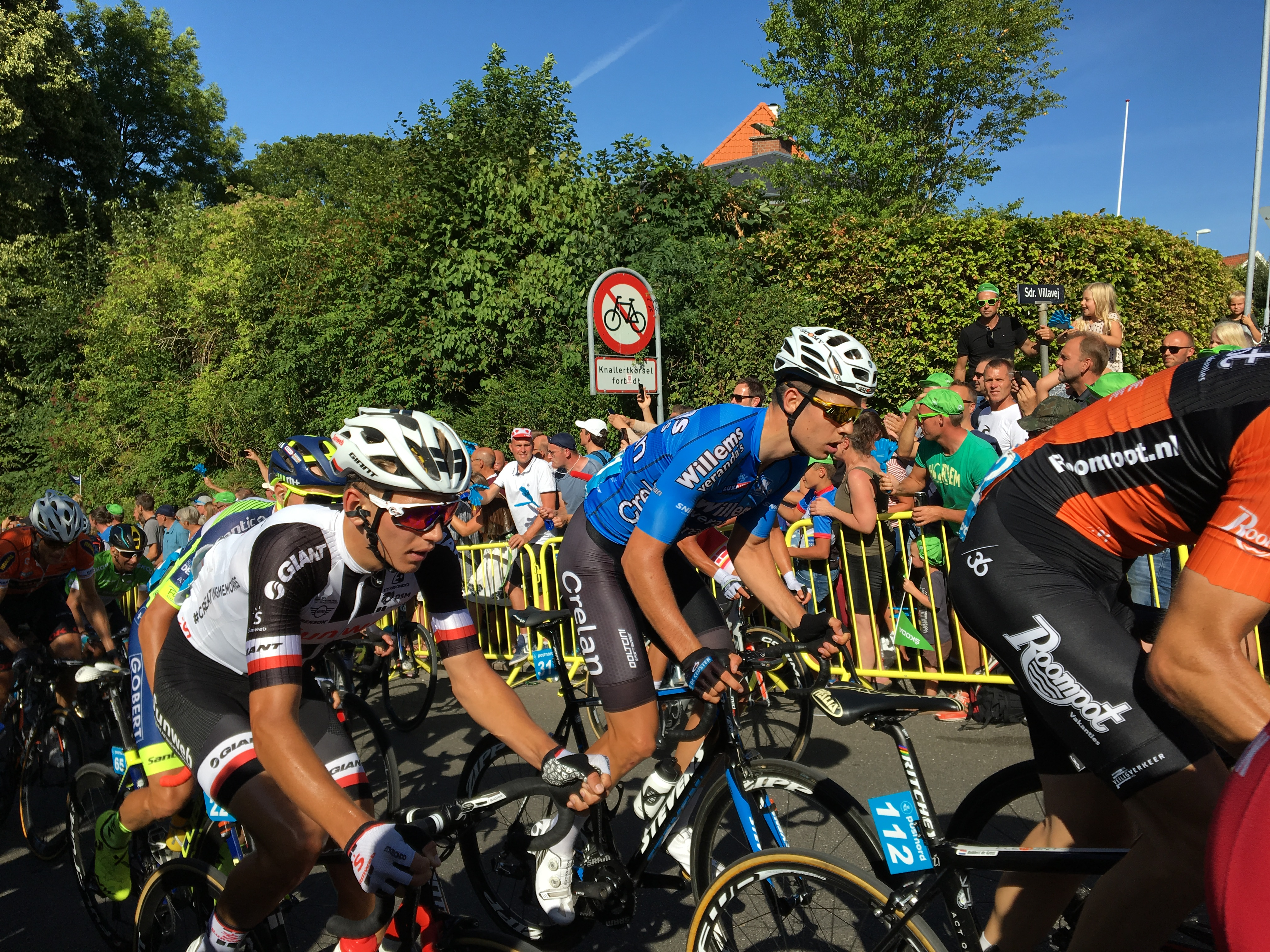 PostNord Danmark Rundt-feltet på vej op ad Kiddesvej i Vejle på 2. etape